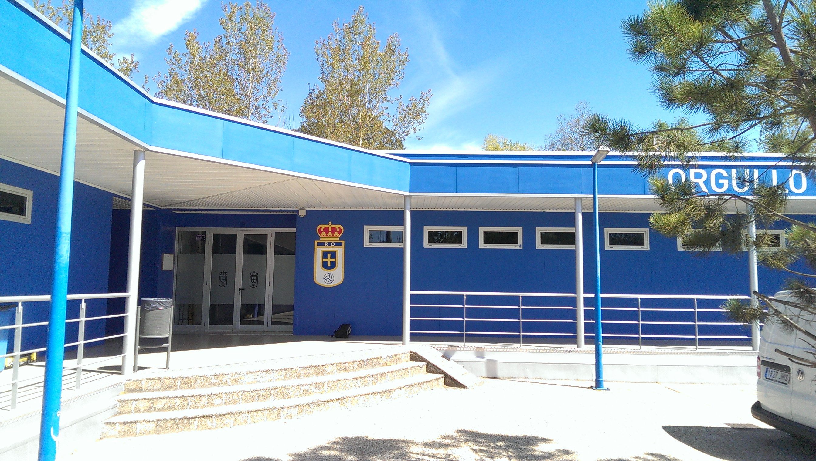 雷克匈体育城内的主建筑